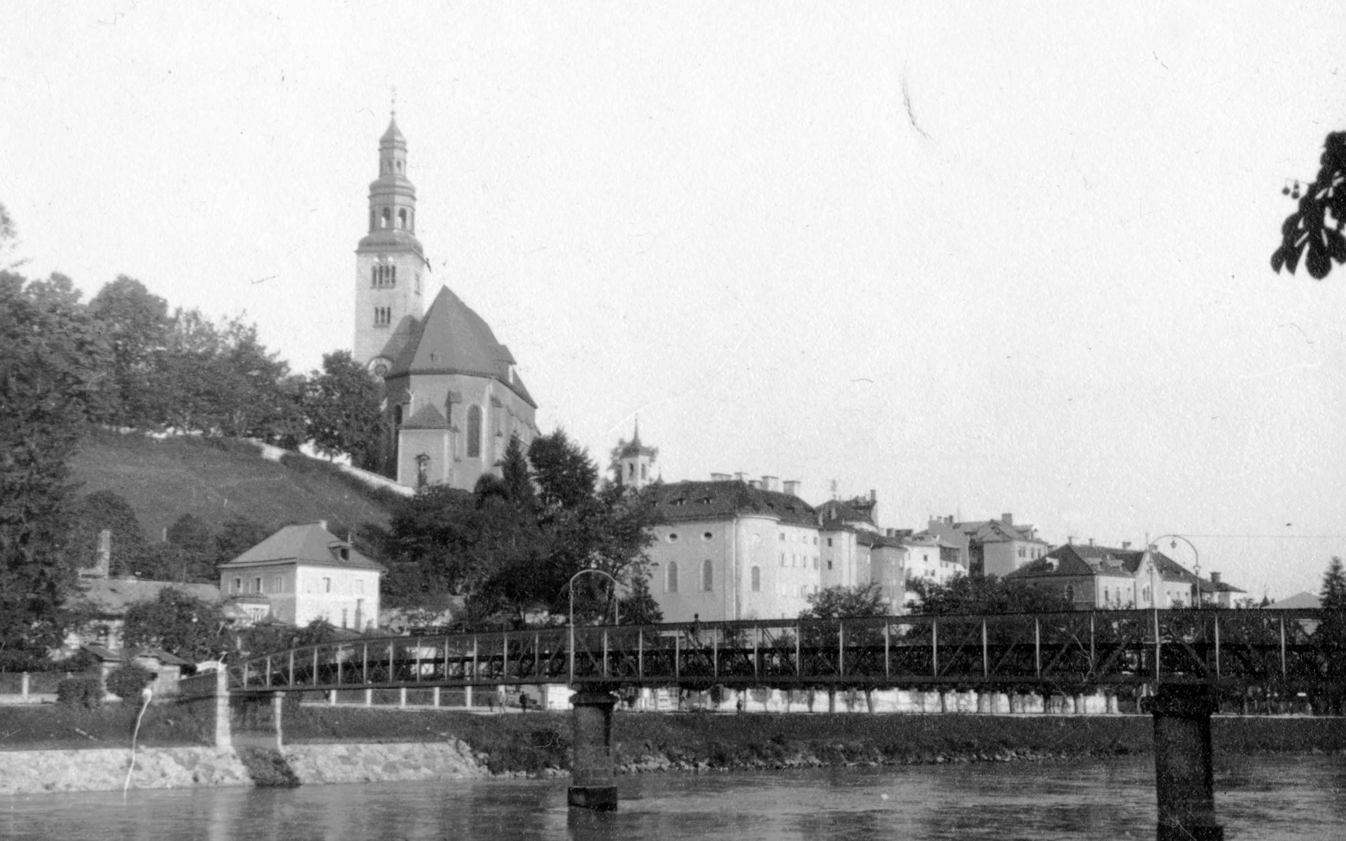 Mülln városrész, Mária mennybevétele plébániatemplom